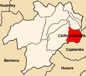 Distrito de Carhuapampa